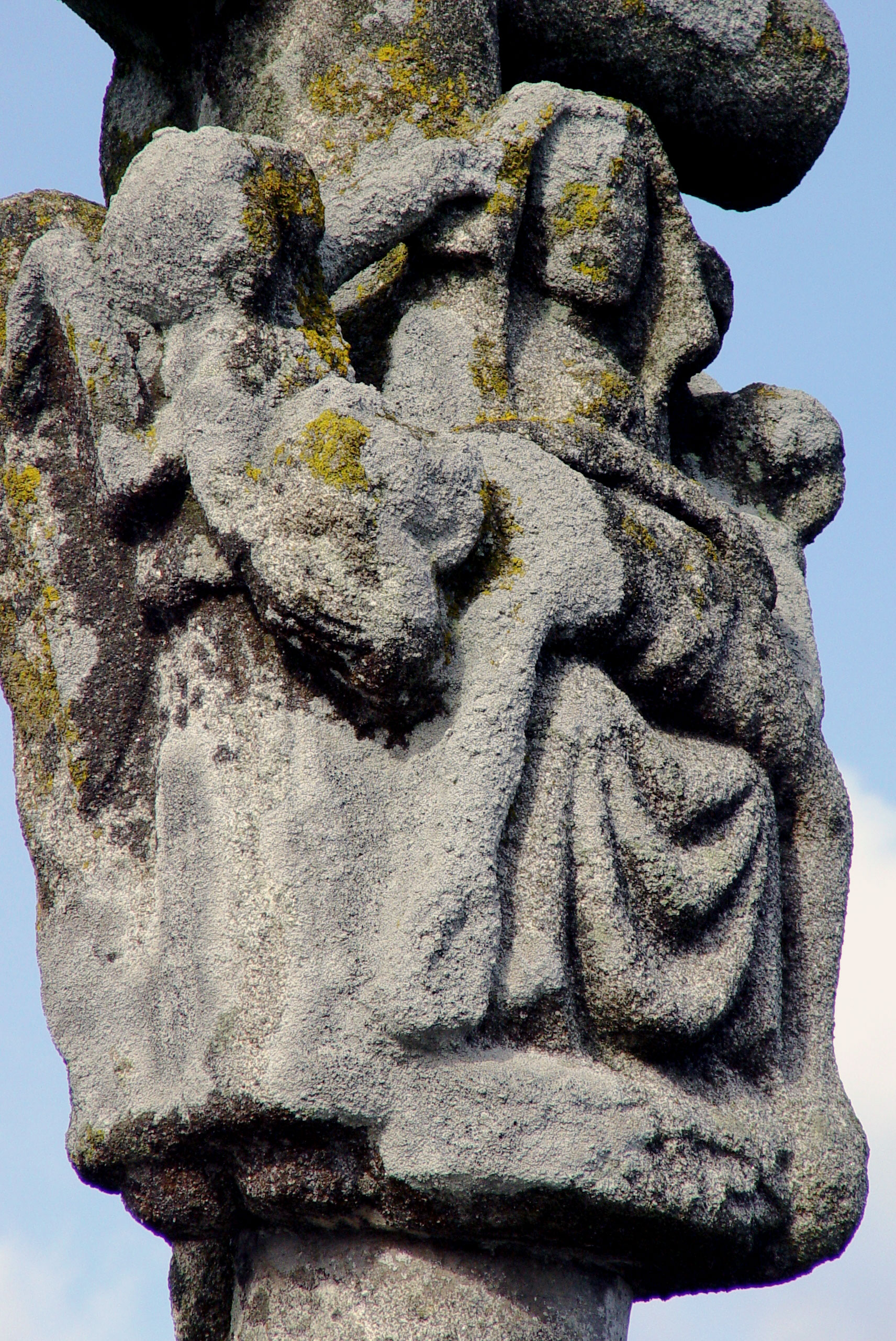 Kalvarienkreuz in Béron, Chateauneuf du Faou (Bretagne, Finistere), Detail: Engel halten den Schleier der Maria